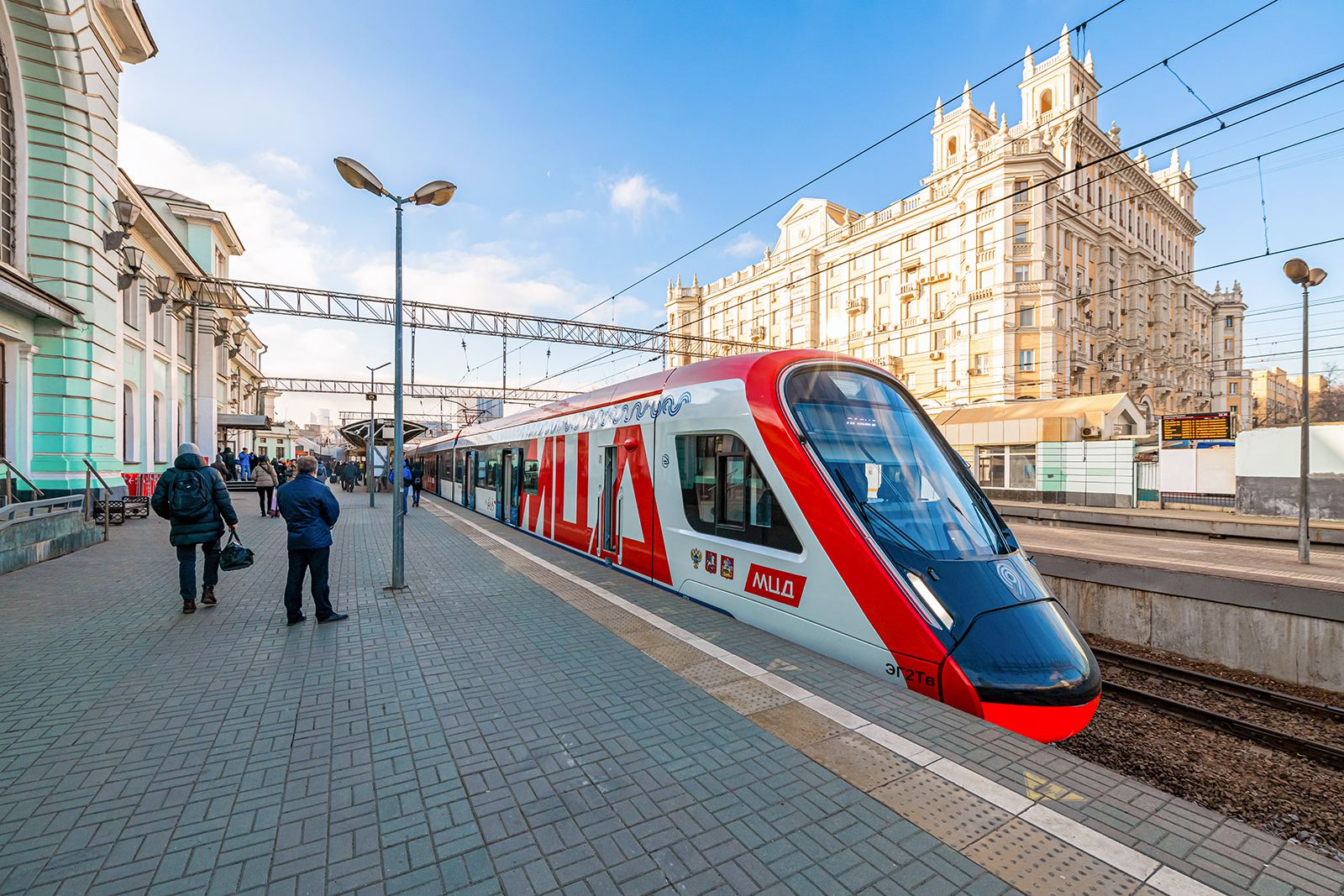 Электропоезд ЭГ2Тв «Иволга» версии 2.0 сообщением Одинцово — Лобня на Белорусском вокзале (платформа 4)